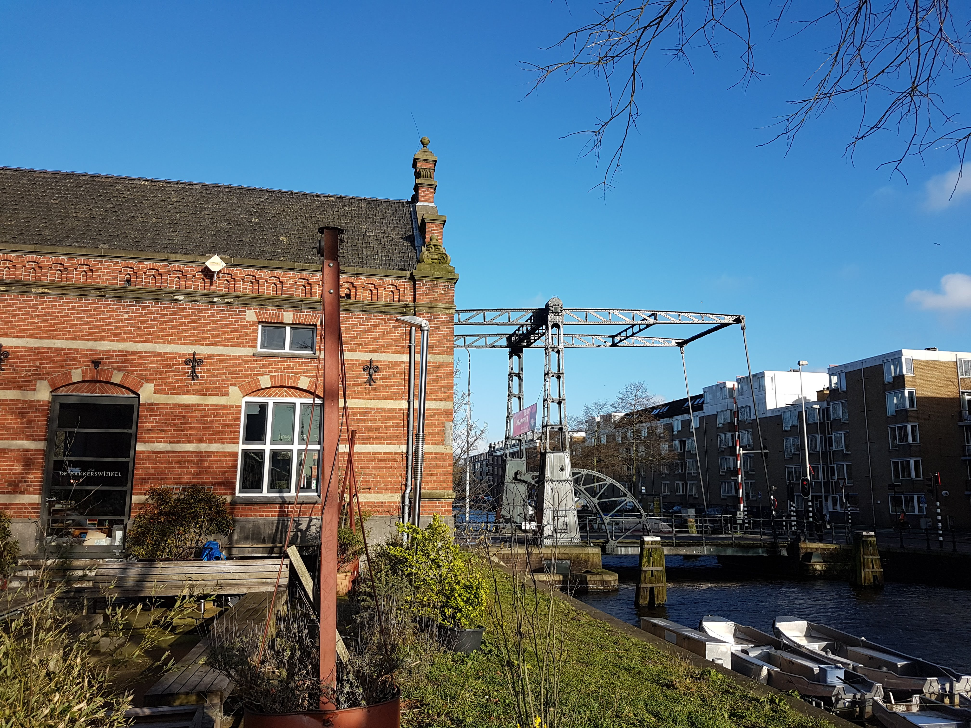 Le pont à bascule à l'entrée de Westerpark, Amsterdam